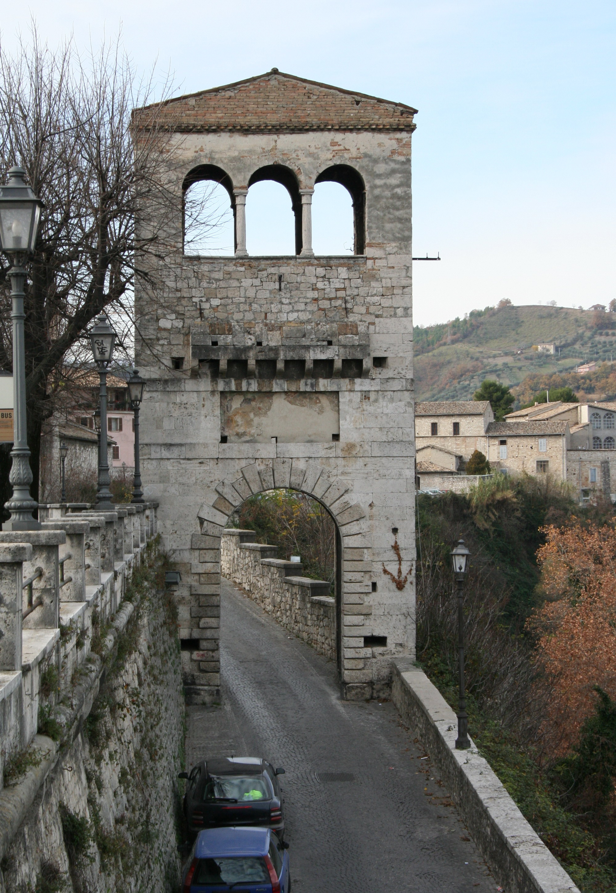 Porta Tufilla di Ascoli Piceno, esterno giorno, proprio scatto Sibilla.io "Utilizzo concesso" Ticket#2007040410014627 (ticket per le immagini) This file is licensed under Creative Commons 3.0 license